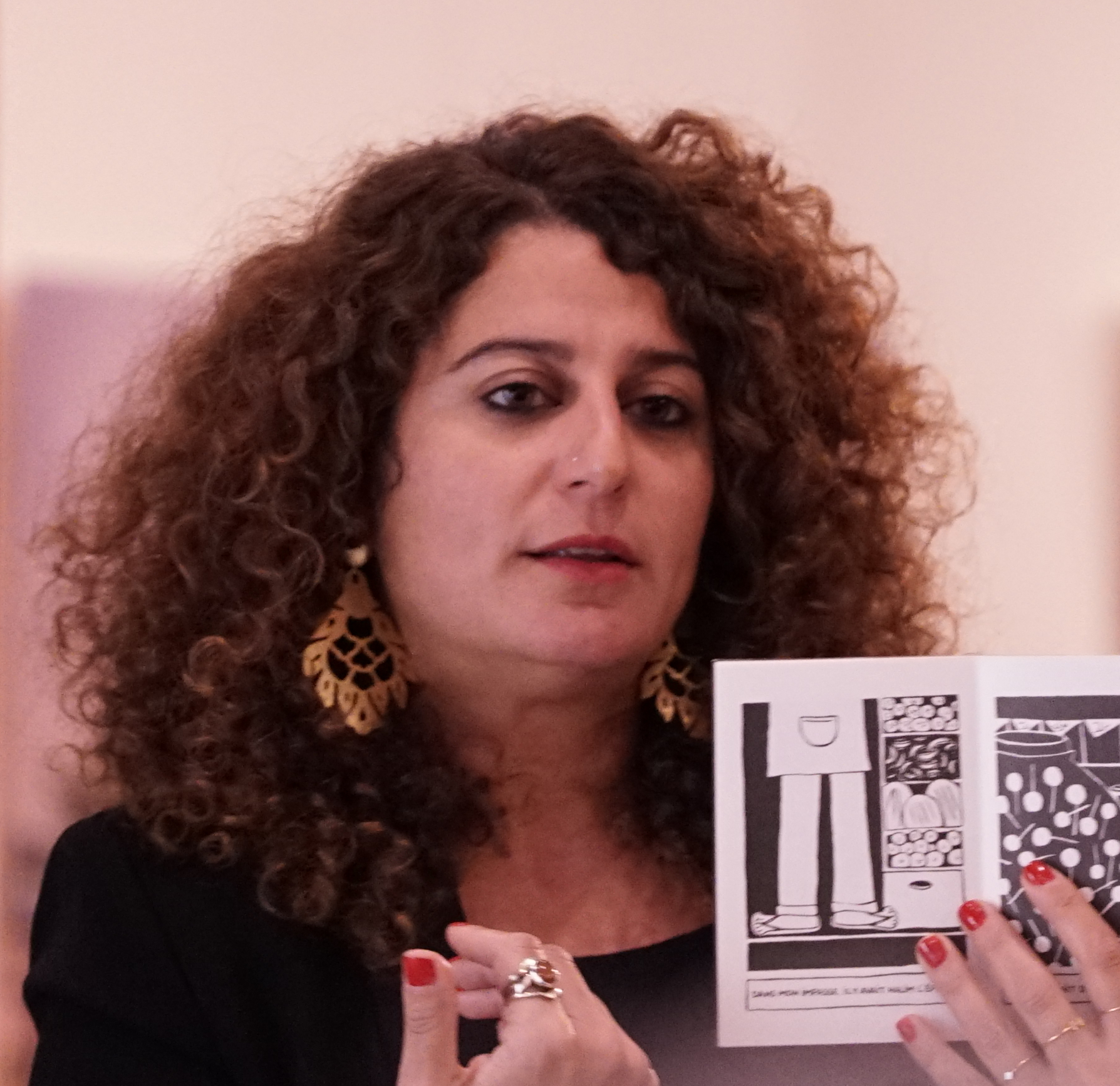 lors du festival Interbibli en la médiathèque Croix Rouge à Reims.